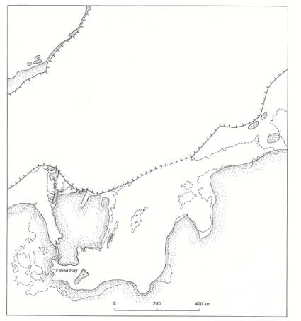 Балтійське льодовикове озеро під час спуску, 11,6 тис. років тому.